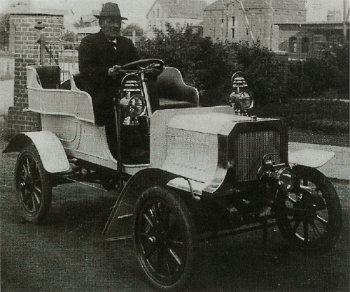 Frans Ramesohl bei einer Testfahrt mit einem Westfalia Motorwagen